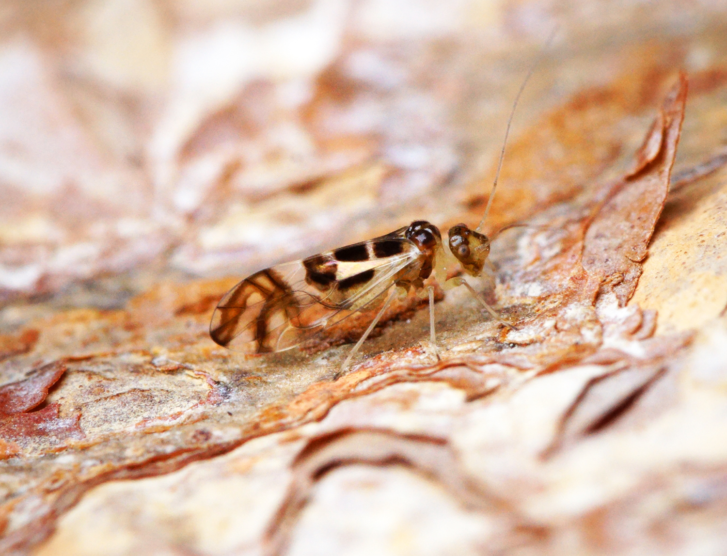 Back Garden - Stevenage - 30/05/18